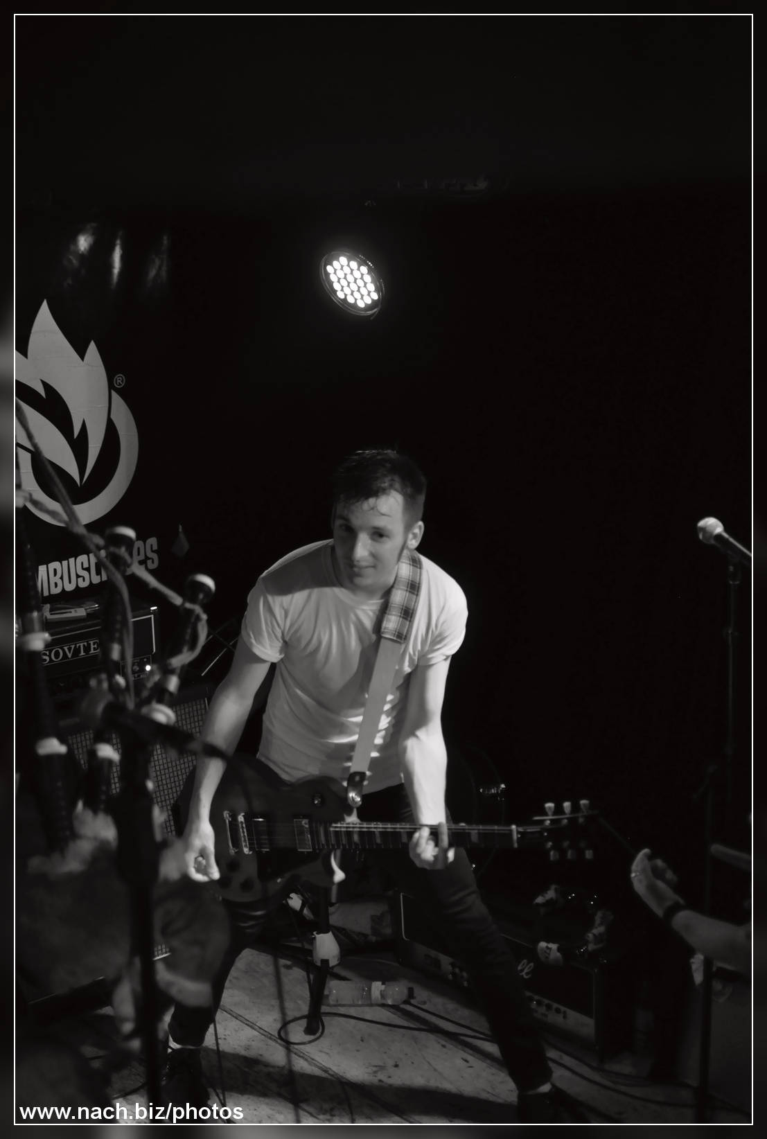 Tomas Novotny (Pipes and Pints) in Aligre-Gare de Lyon, Paris, Ile-de-France, FR